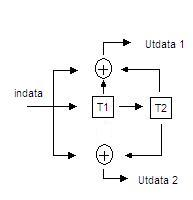 Schematisk bild hur en faltningskodare kan fungera